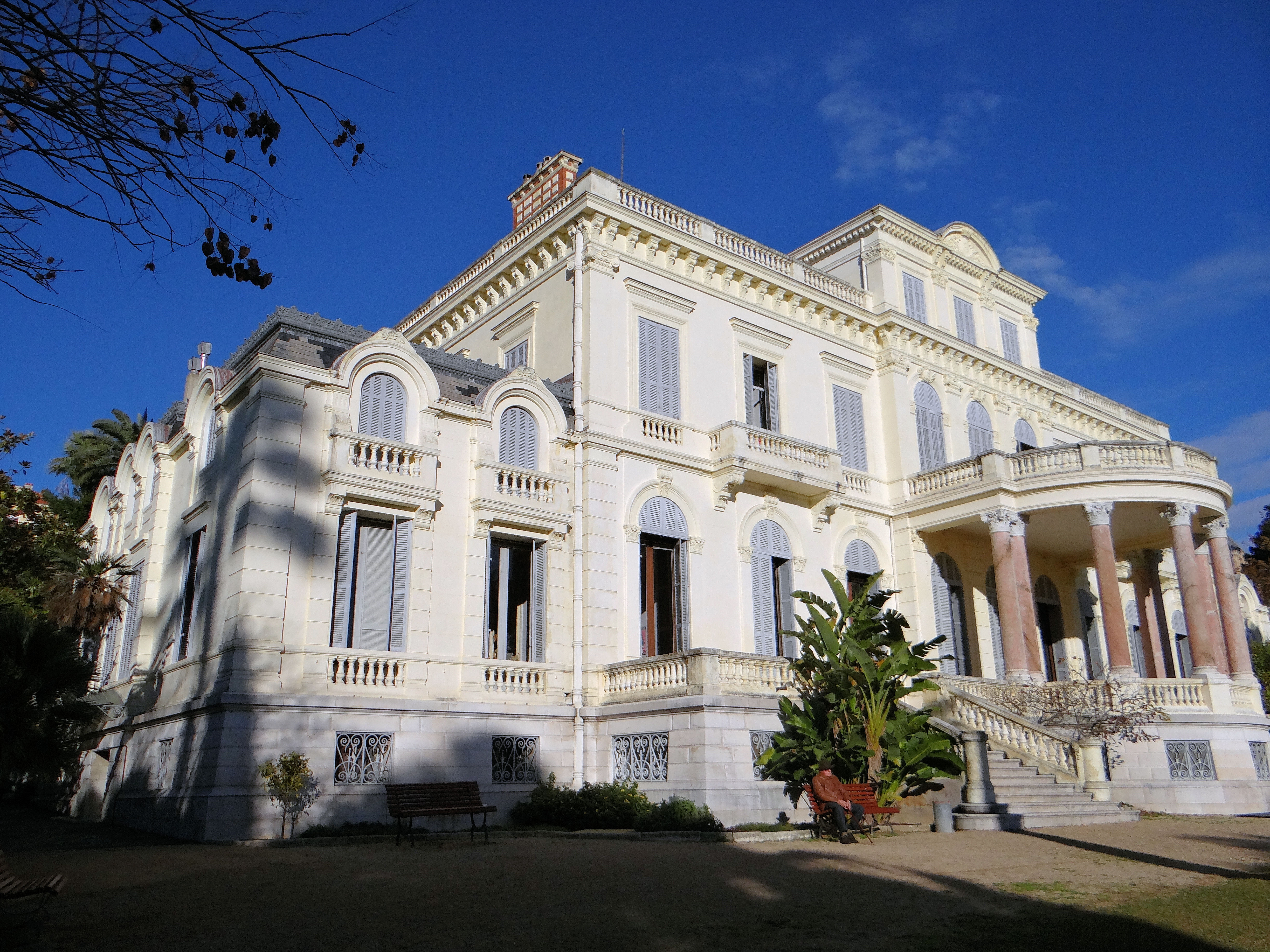 Cannes - Villa Rothschild - Façade sud